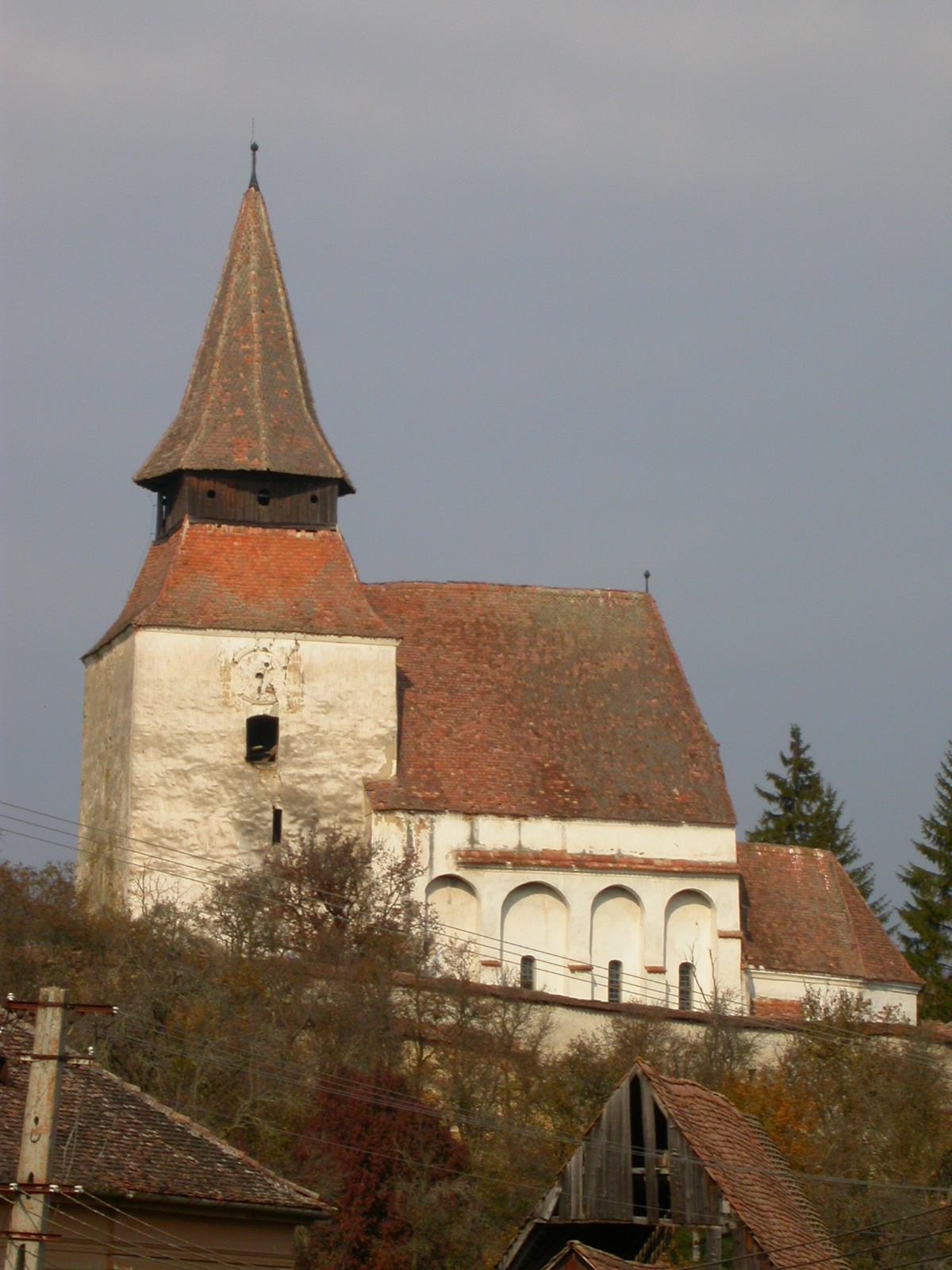 Ansamblul bisericii evanghelice fortificate, sec. XIV - XVII